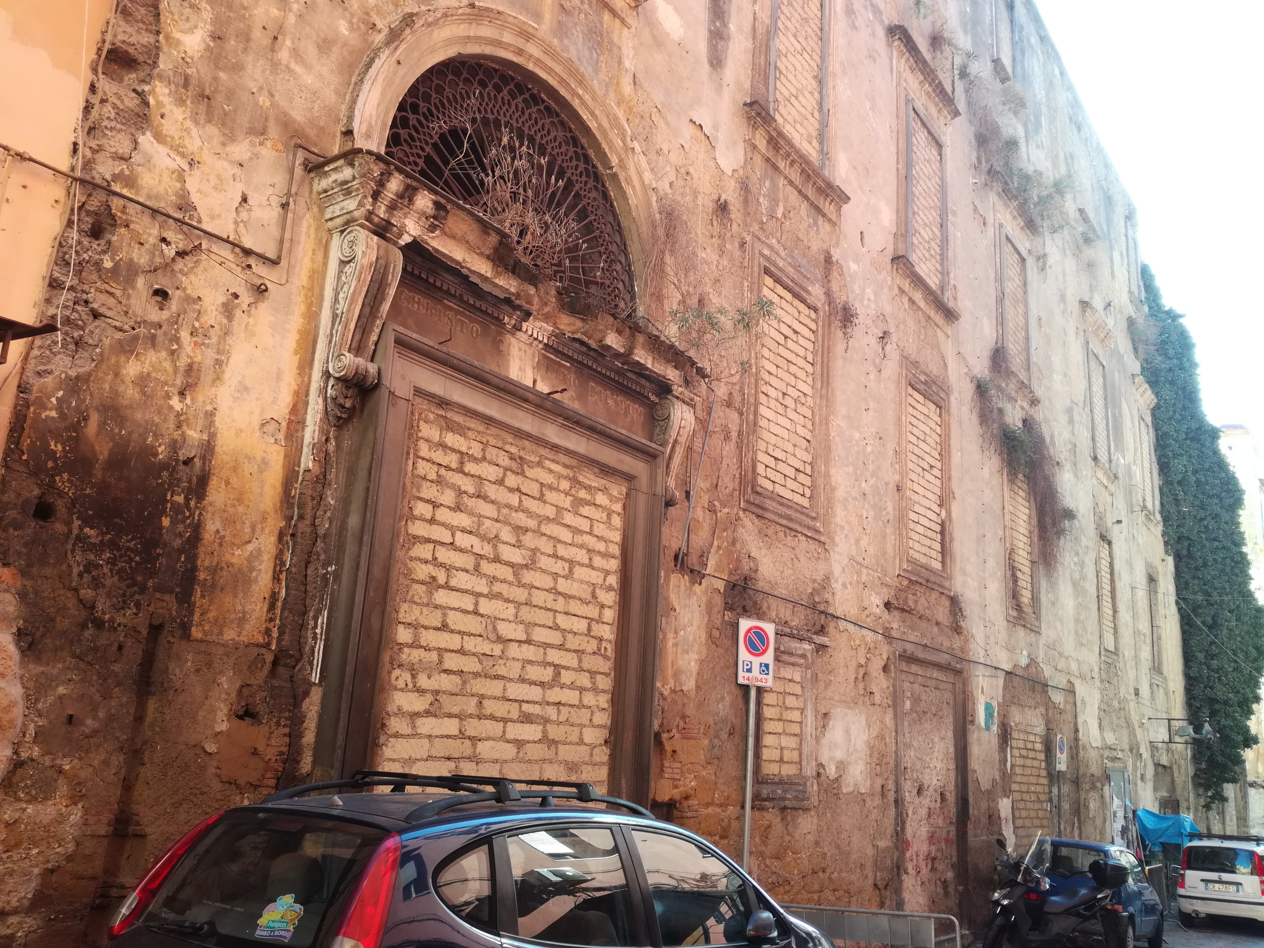 Maria a Sicola (Napoli)